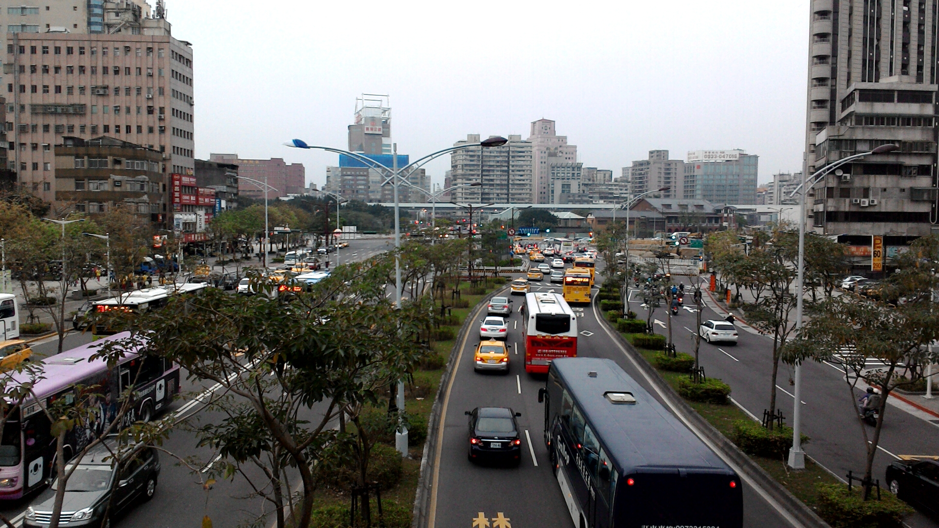 在臺北市中華路一段天橋往北門方向拍攝